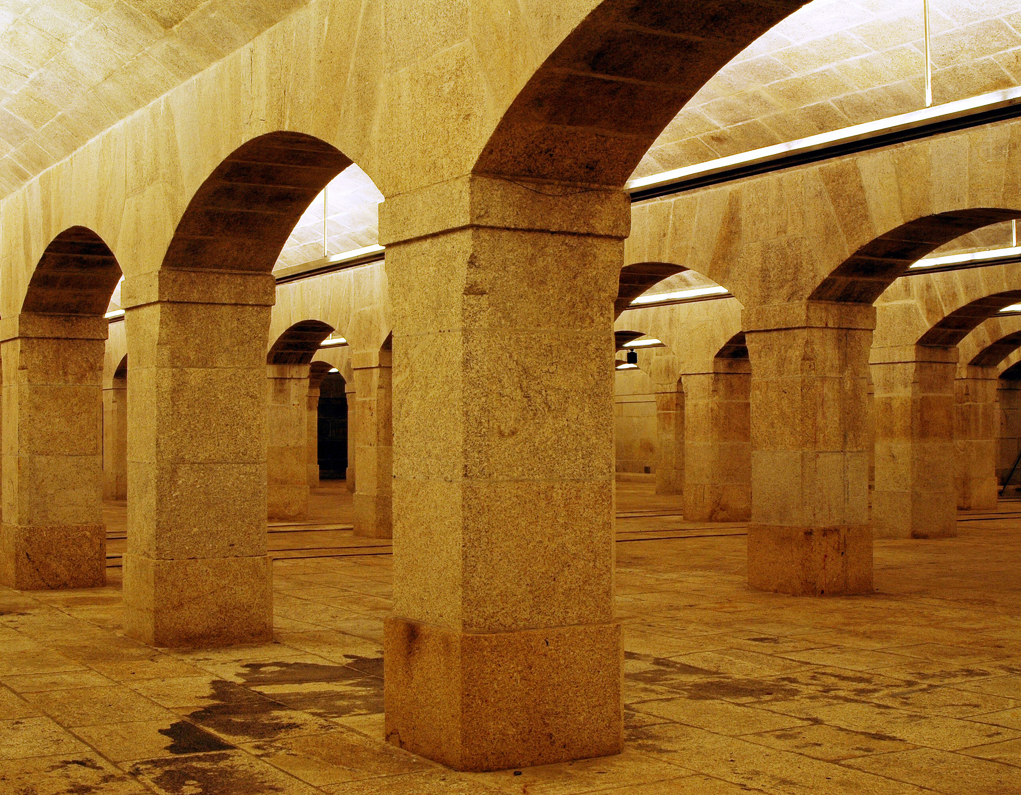 Alfândega Nova - Cave This file was uploaded for Wiki Loves Monuments in Portugal with the unique identifier 70765.